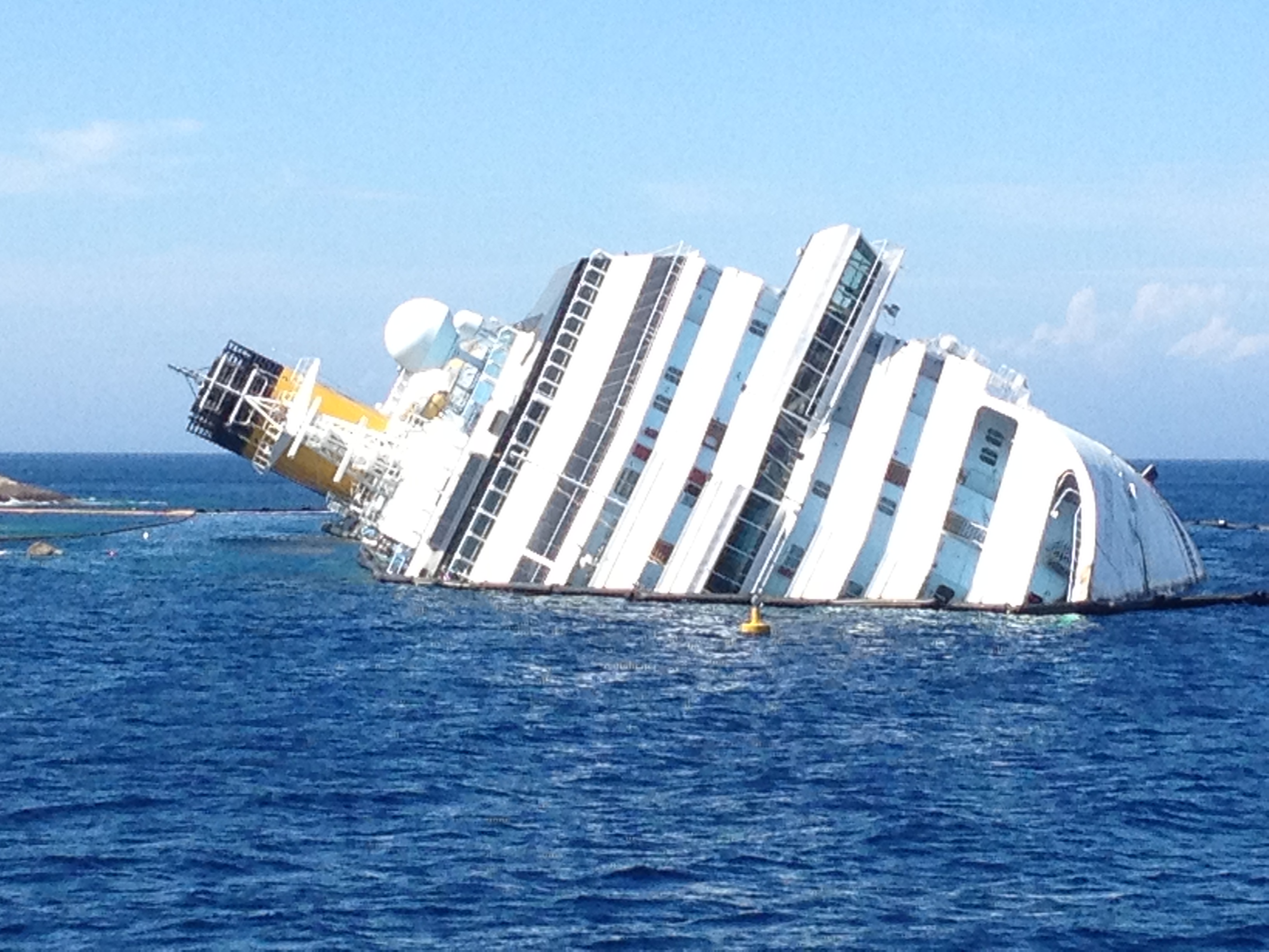 Visuale dall'isola del Giglio della nave Costa Concordia incagliata di fronte all'isola.